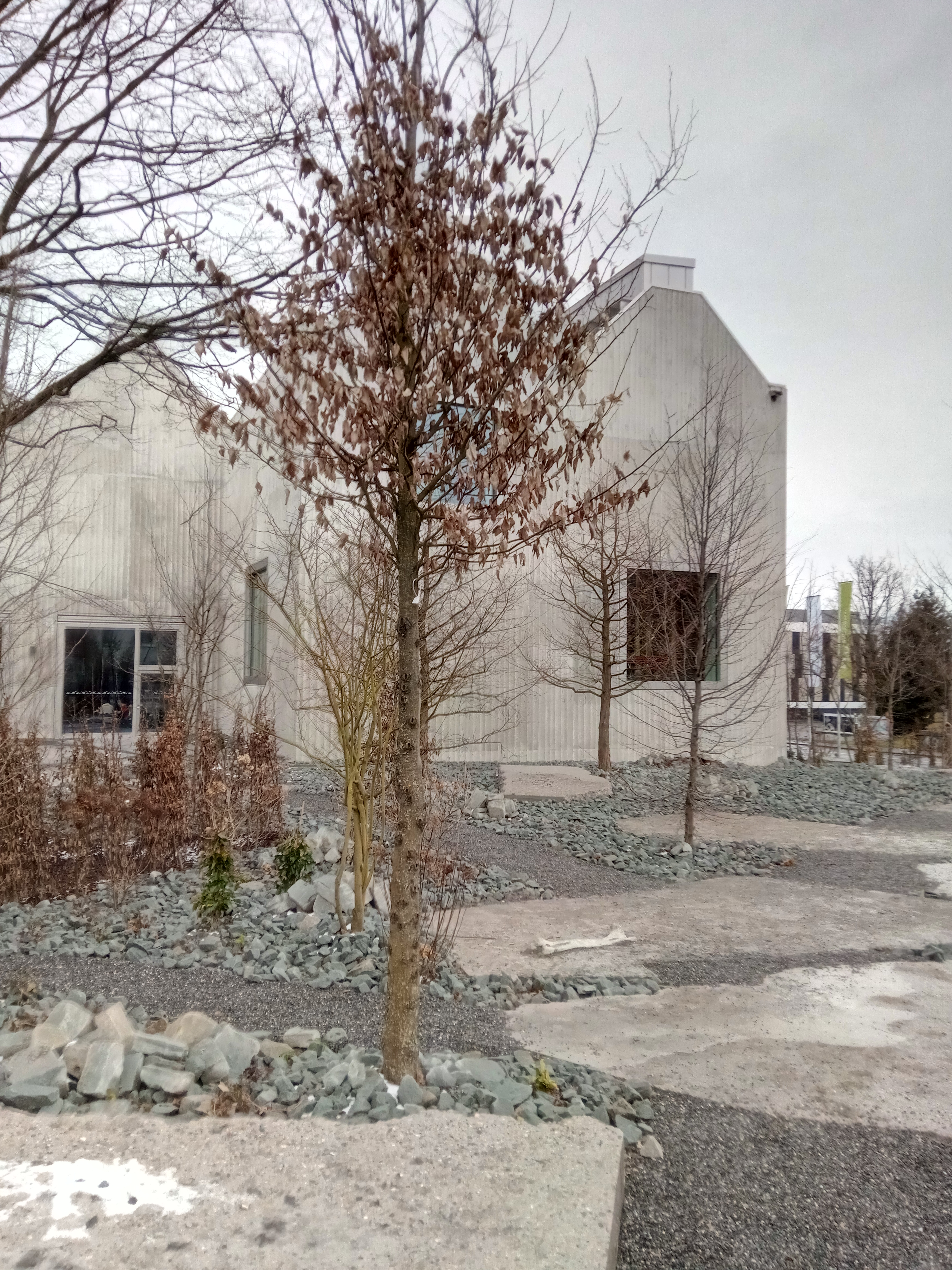 Blick vom kleinen Museumspark auf die Westfassade des Naturmuseums